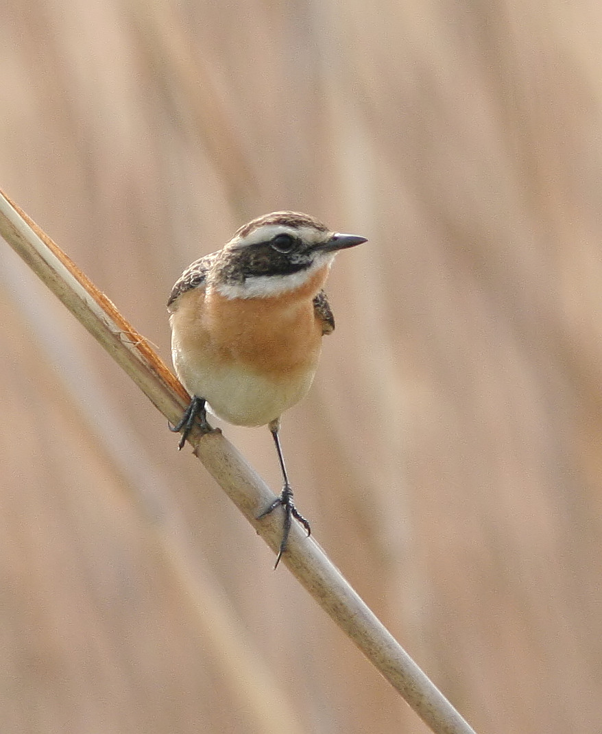 Saxicola rubetra, male, in Lasy Janowskie, Poland